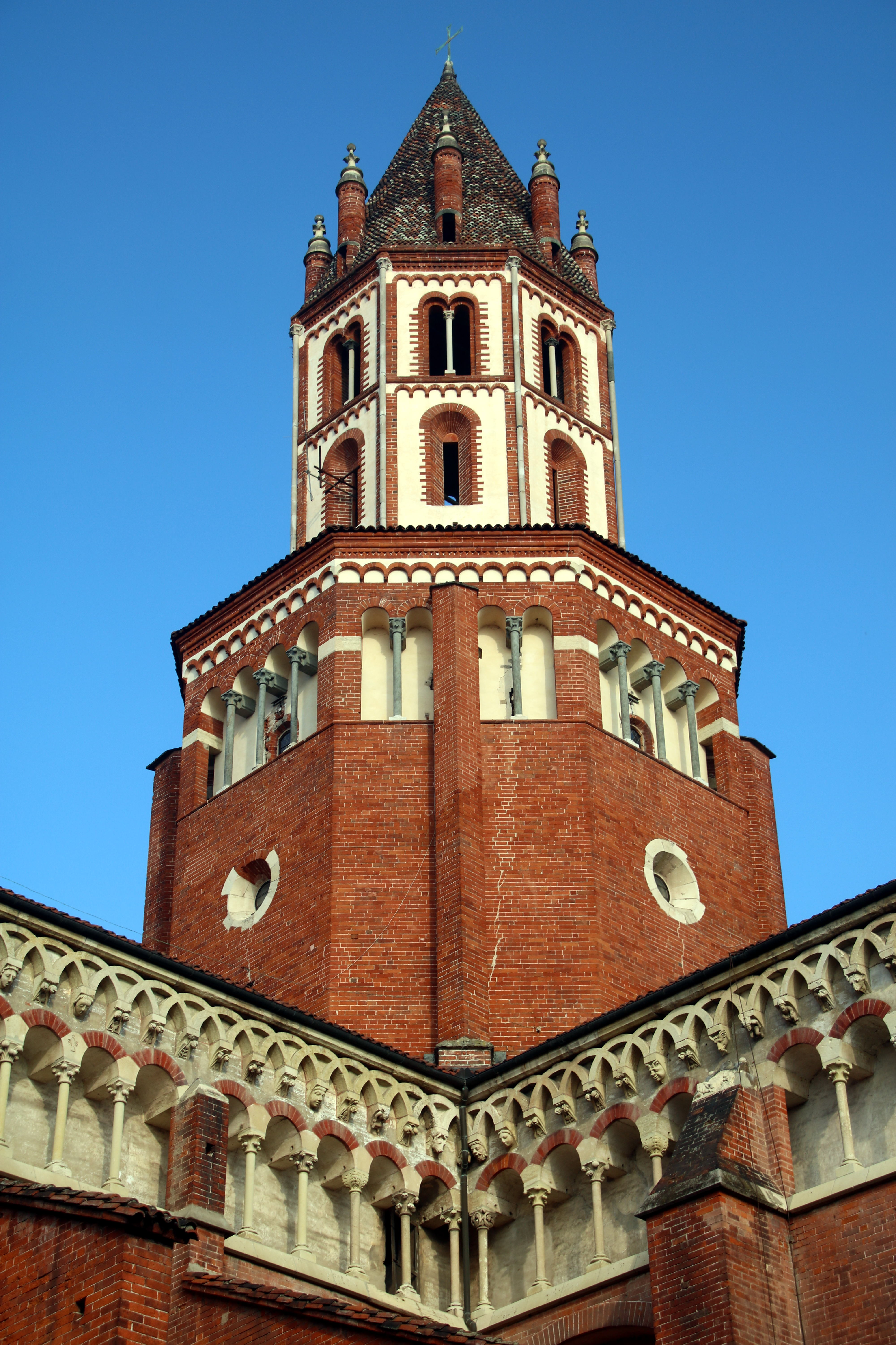 basilica di Sant'Andrea This is a photo of a monument which is part of cultural heritage of Italy.